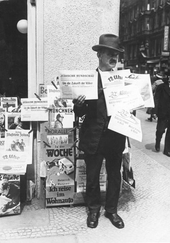 Jüdische Zeitungen werden in Berlin gehandelt! Trotz Meldungen einer gewissen Emigrantenpresse im Auslande, wonach jüdische Zeitungen in Deutschland nicht erscheinen dürfen, ist hier der Gegenbeweis. Ein Berliner Zeitungshändler in der Friedrichstraße handelt mit anderen Zeitungen der Tagespresse, auch die Jüdische Rundschau.